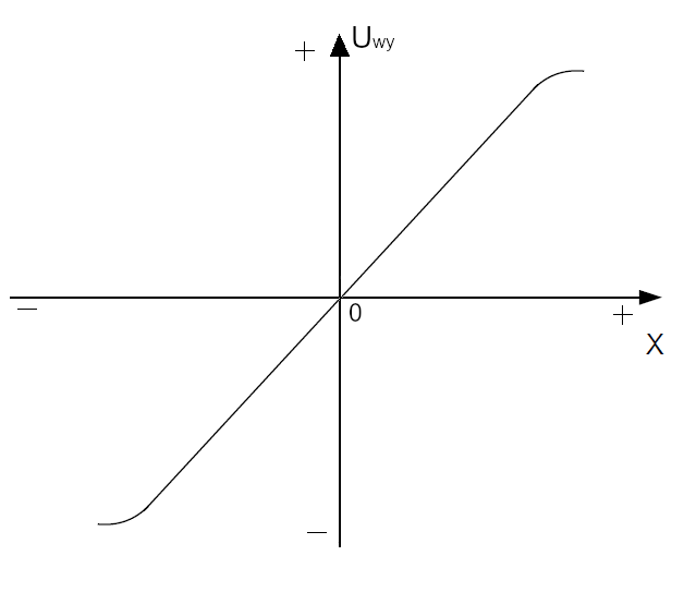 Charakterystyka przetwarzania po kondycjonowaniu sygnału